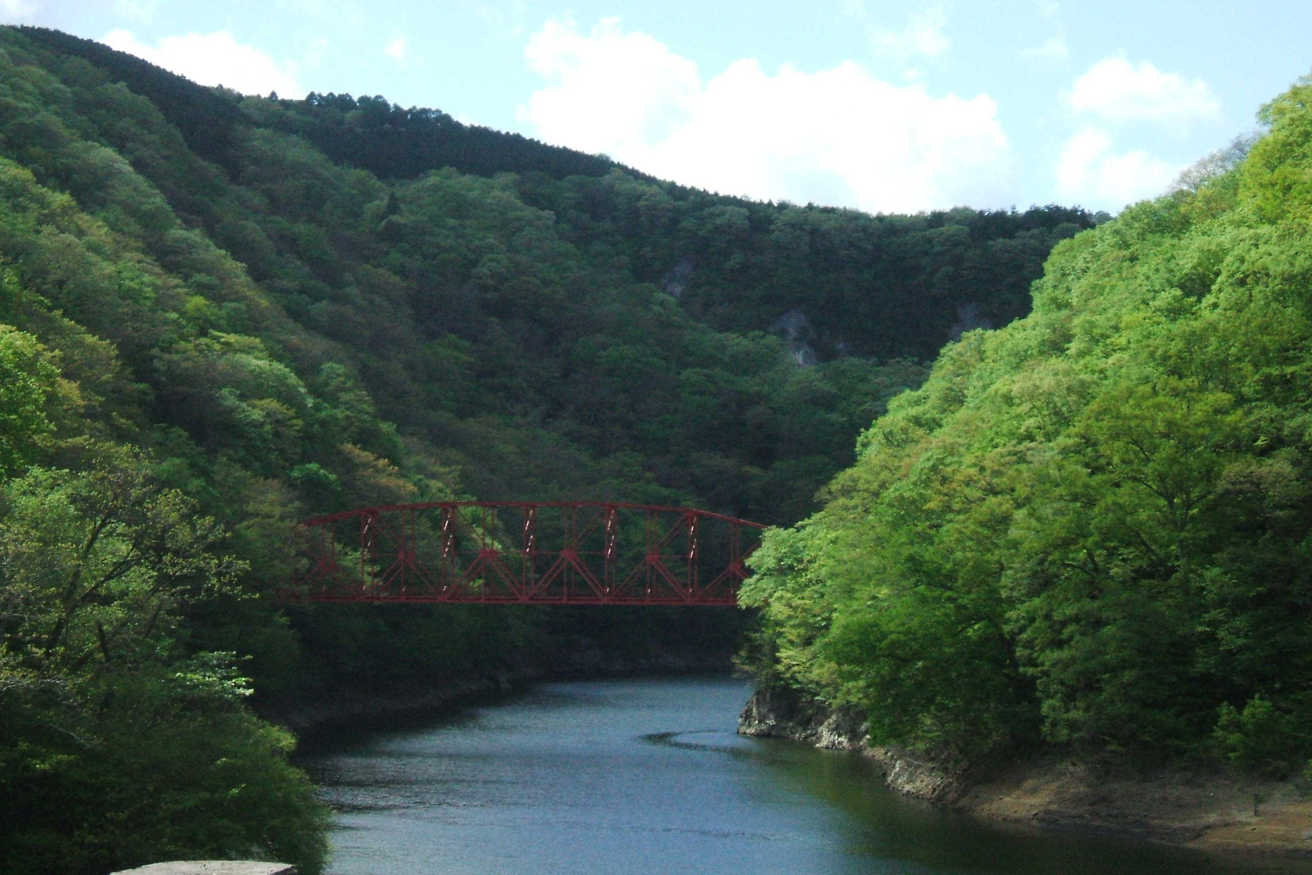 広島県にある帝釈峡にかかる神龍橋